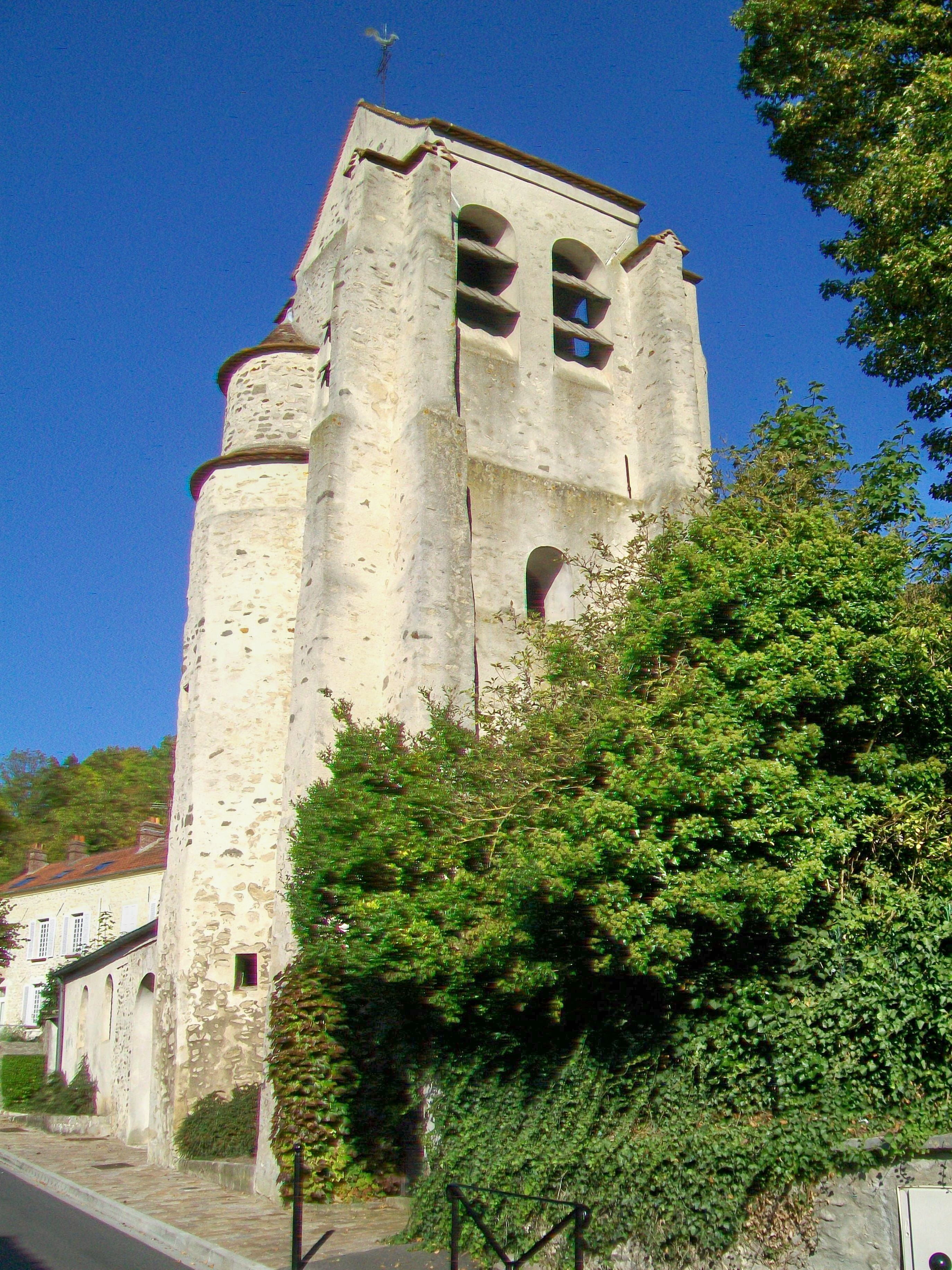 La tour de l'église Saint-Nicolas date en partie du XIIe siècle.